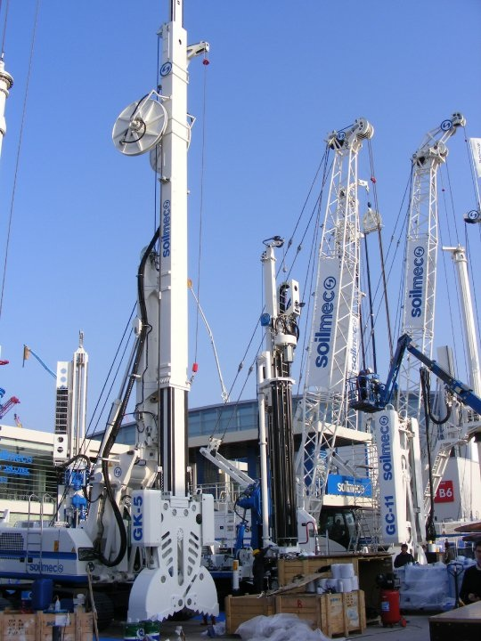 Soilmec stand auf der Bauma 2010